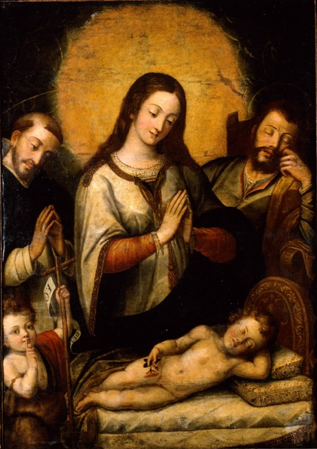 Virgen con el Niño, San José, San Juanito y Santo Domingo de Guzmán, óleo sobre lienzo, 162 x 123 cm. Museo de Bellas Artes de Sevilla Procedente de la Colección de la familia Contreras Rodríguez-Jurado adquirido por la Junta de Andalucía en el año 2006